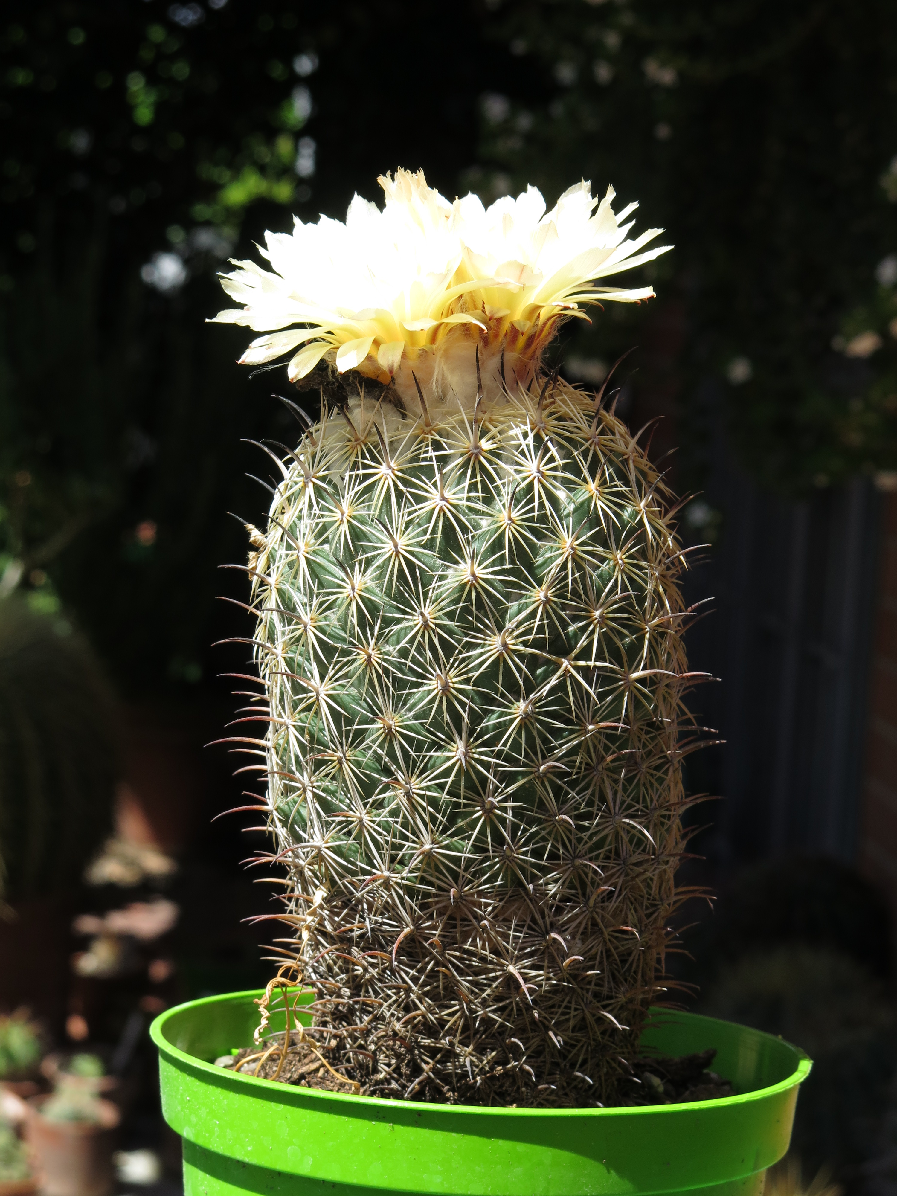 Coryphantha cornifera in fiore